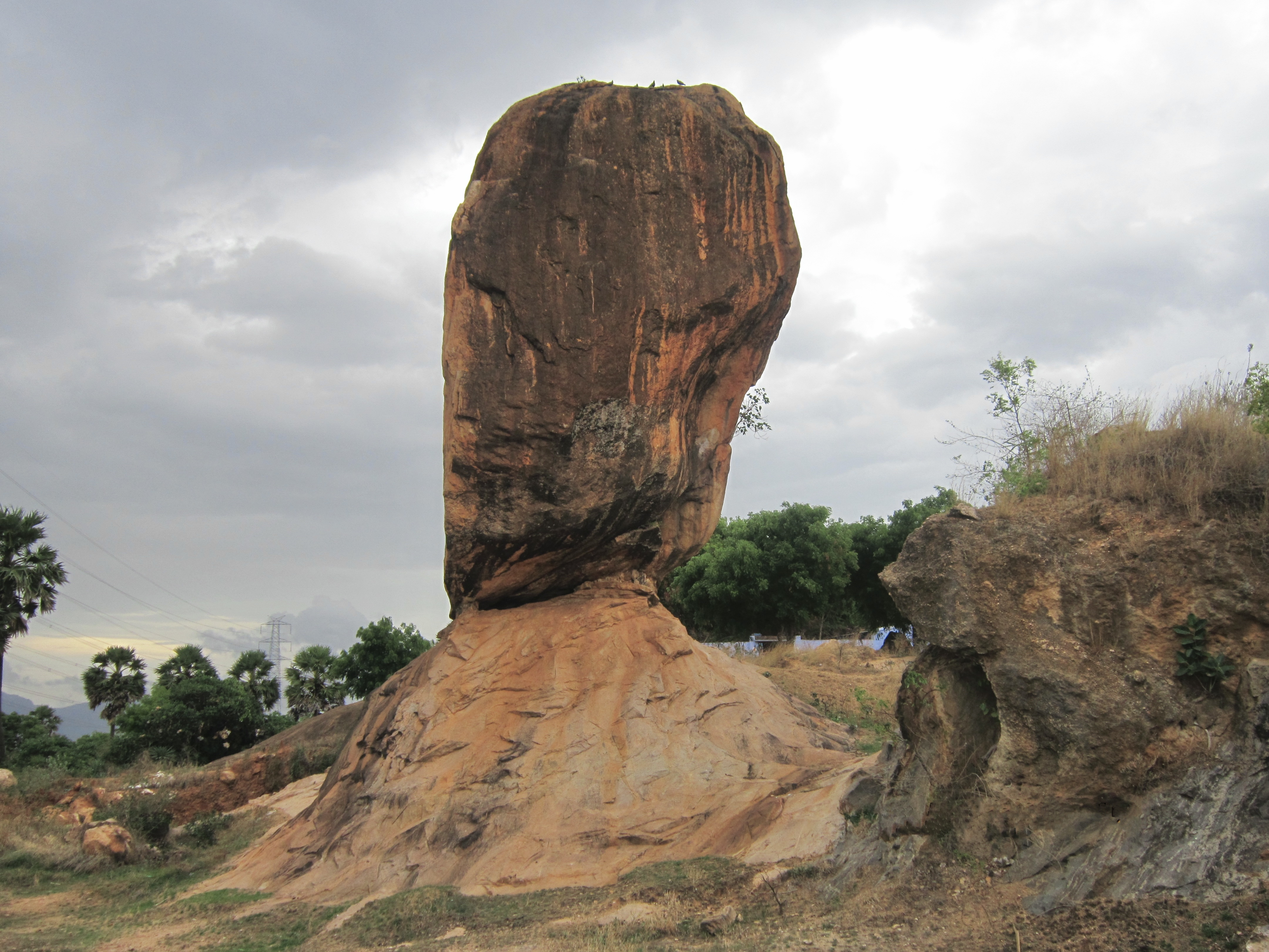 இது தென்காசியிலுள்ள குத்துக்கல் வலசைப்பகுதியில் உள்ள ஒரு கல். இங்குள்ளவர்கள் இது இயற்கையாய் உருவானதாகவும் இதை முன்னோர் காலத்தில் வழிபட்டதாகவும் கூறுகின்றனர். This is a balanced stone in Tenkasi Taluk (Kuthukal valasai), Tamil Nadu, India.